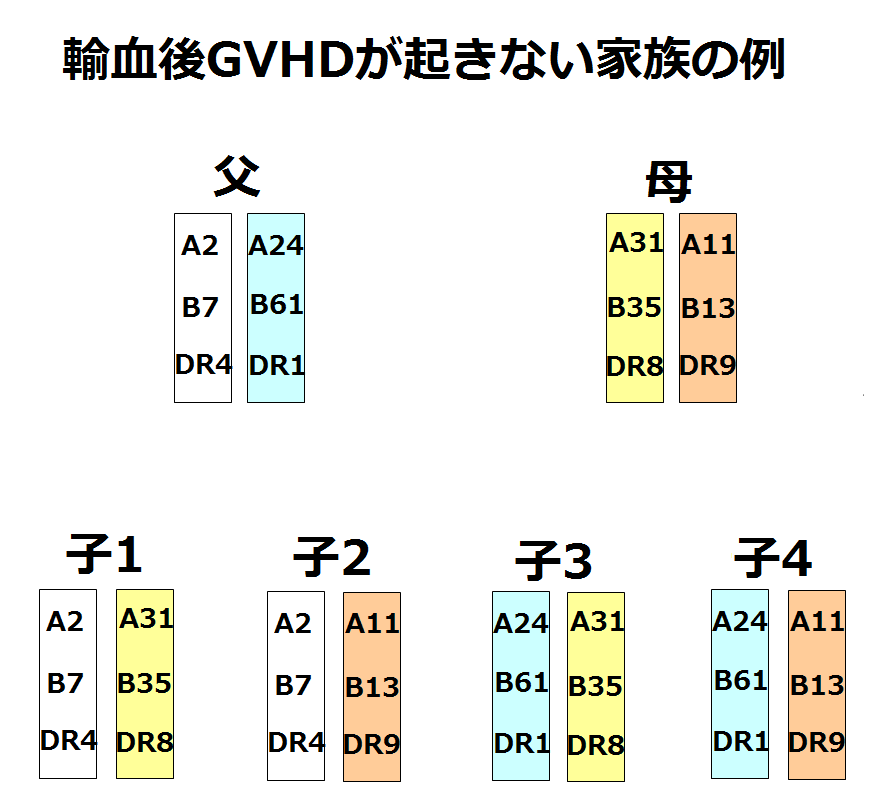 輸血後GVHDがおきない家族の1例